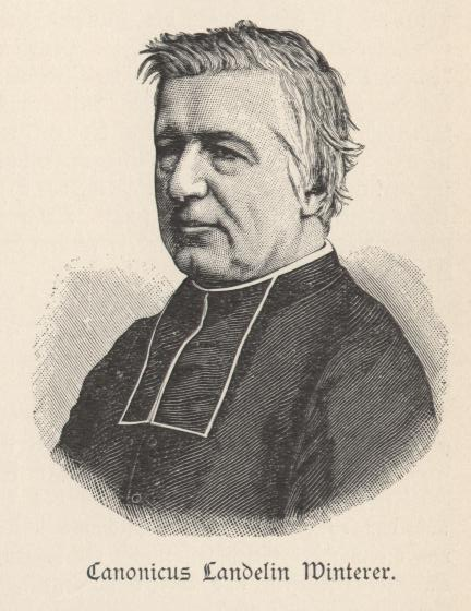 Landelin Winterer, elsässischer Priester und Reichstagsabgeordneter in Berlin